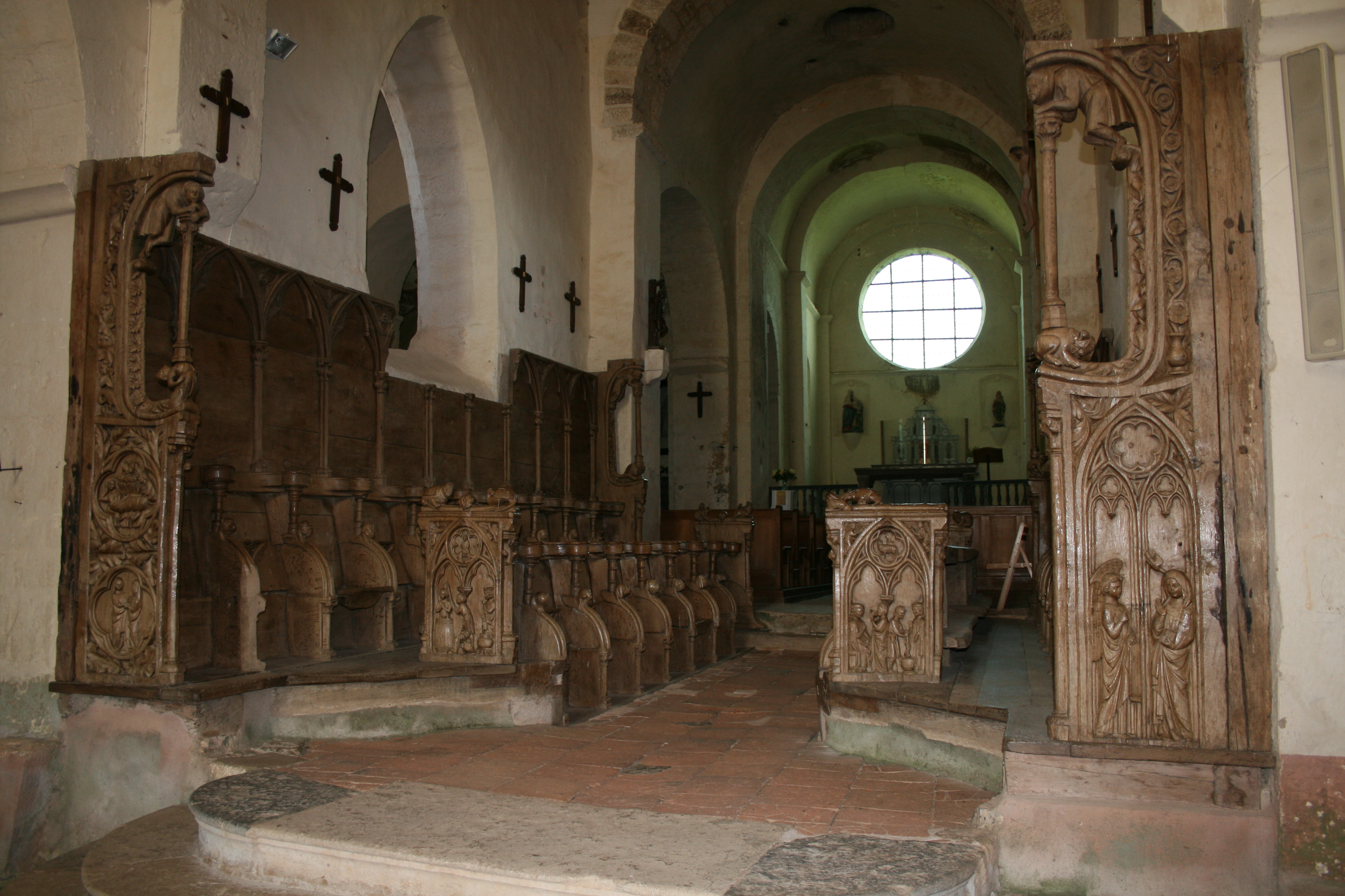 Stalles, Église Saint-Jean-l'Evangeliste de Bard-le-Régulier, Côte-d'Or, France.